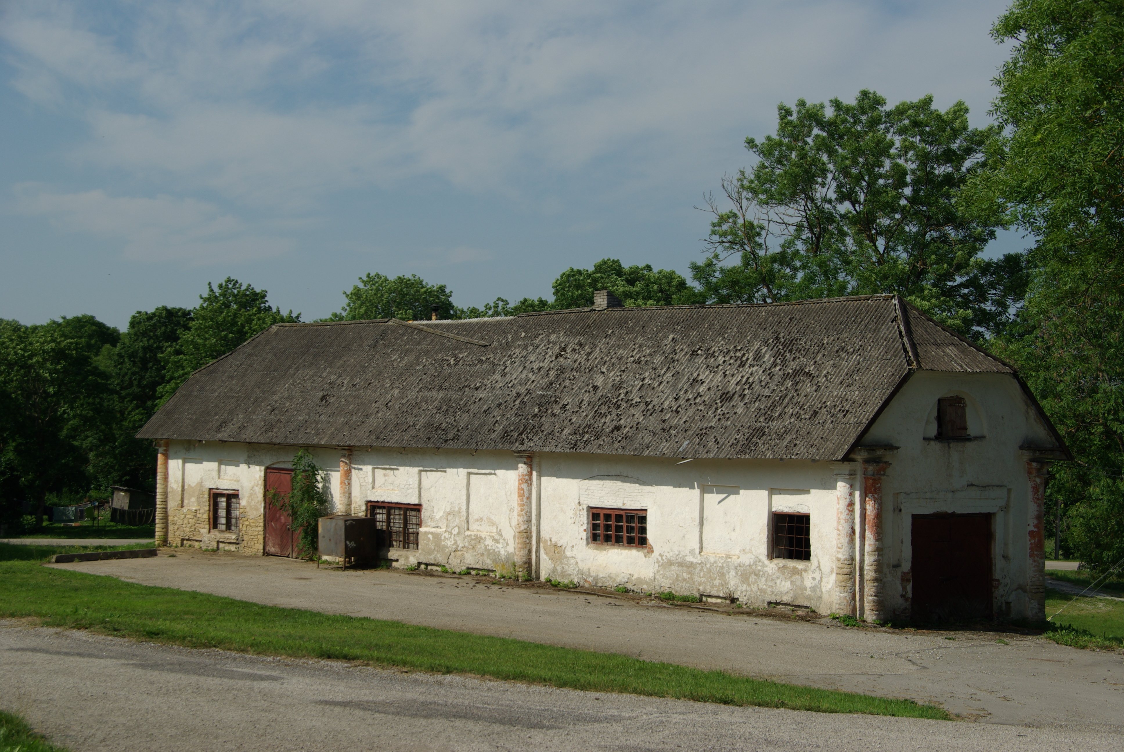 Lääne maakond, Lihula vald, Lihula linn